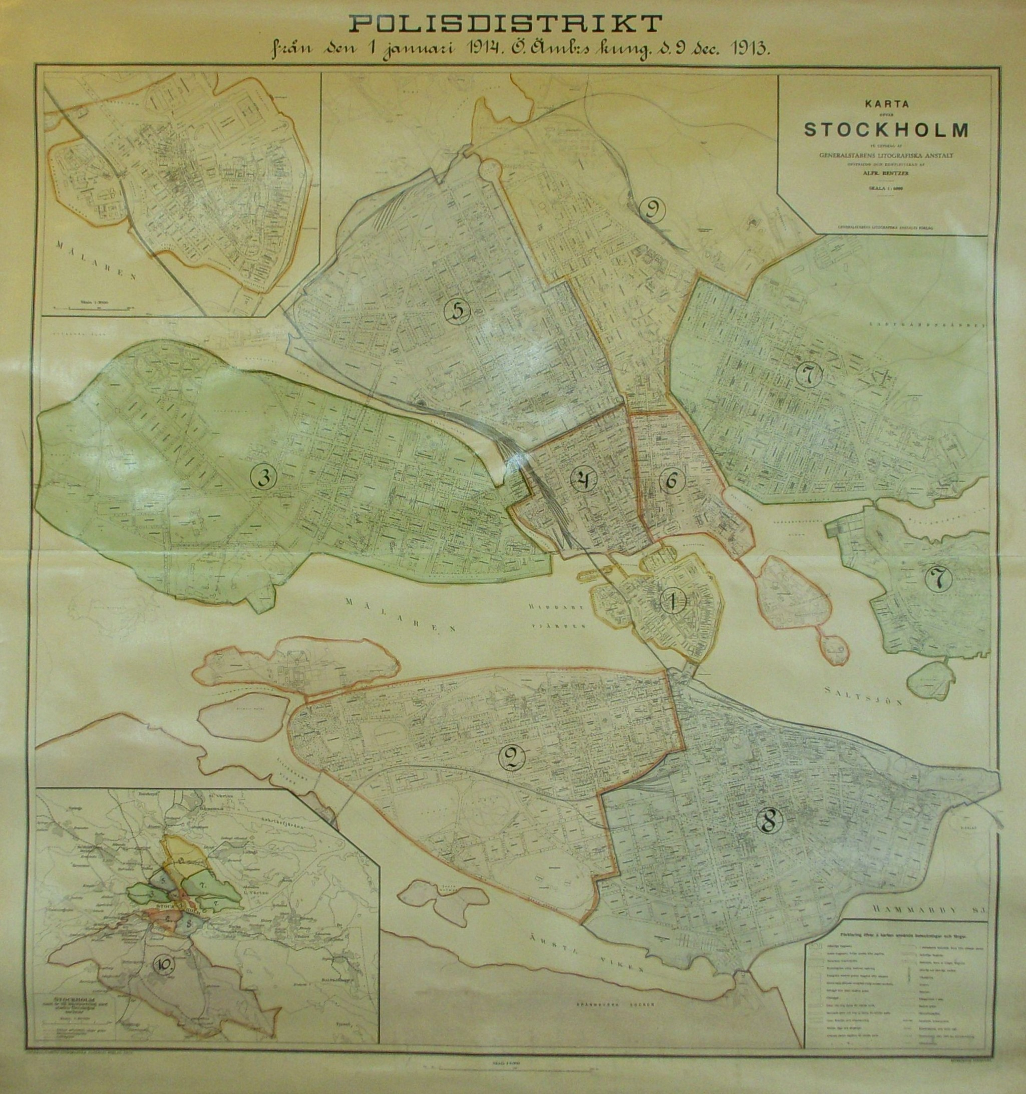 Stockholms polisdistrikt för 1914